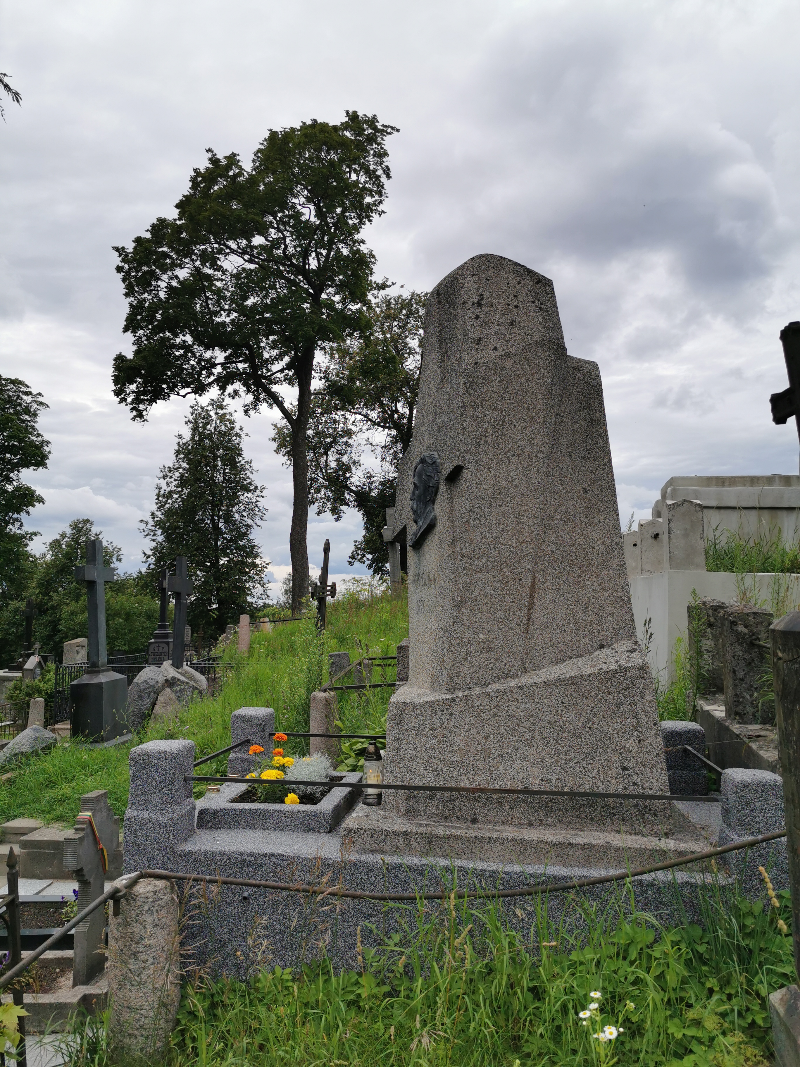 Mikalojaus Konstantino Čiurliono antkapis. Mikalojus Konstantinas Čiurlionis (1875 m. rugsėjo 22 d. – 1911 m. balandžio 10 d. Pustelnike, netoli Varšuvos, palaidotas Vilniaus Rasų kapinėse) – lietuvių kompozitorius, dailininkas, chorvedys, kultūros veikėjas.